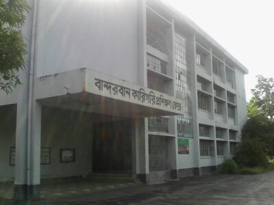 বান্দরবান কারিগরি প্রশিক্ষণ কেন্দ্র